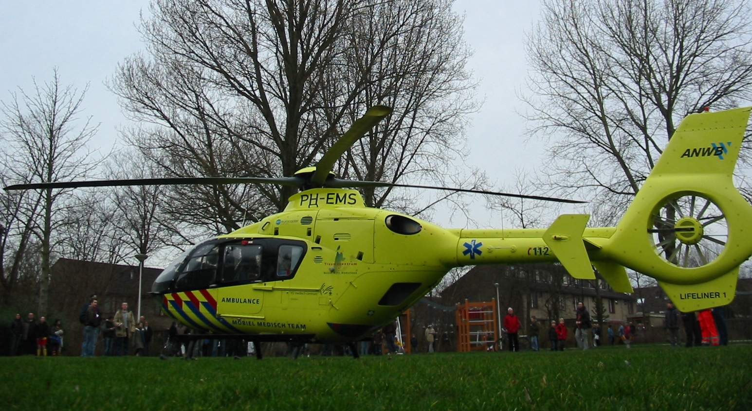 Helikopter van het Mobiel Medisch Team